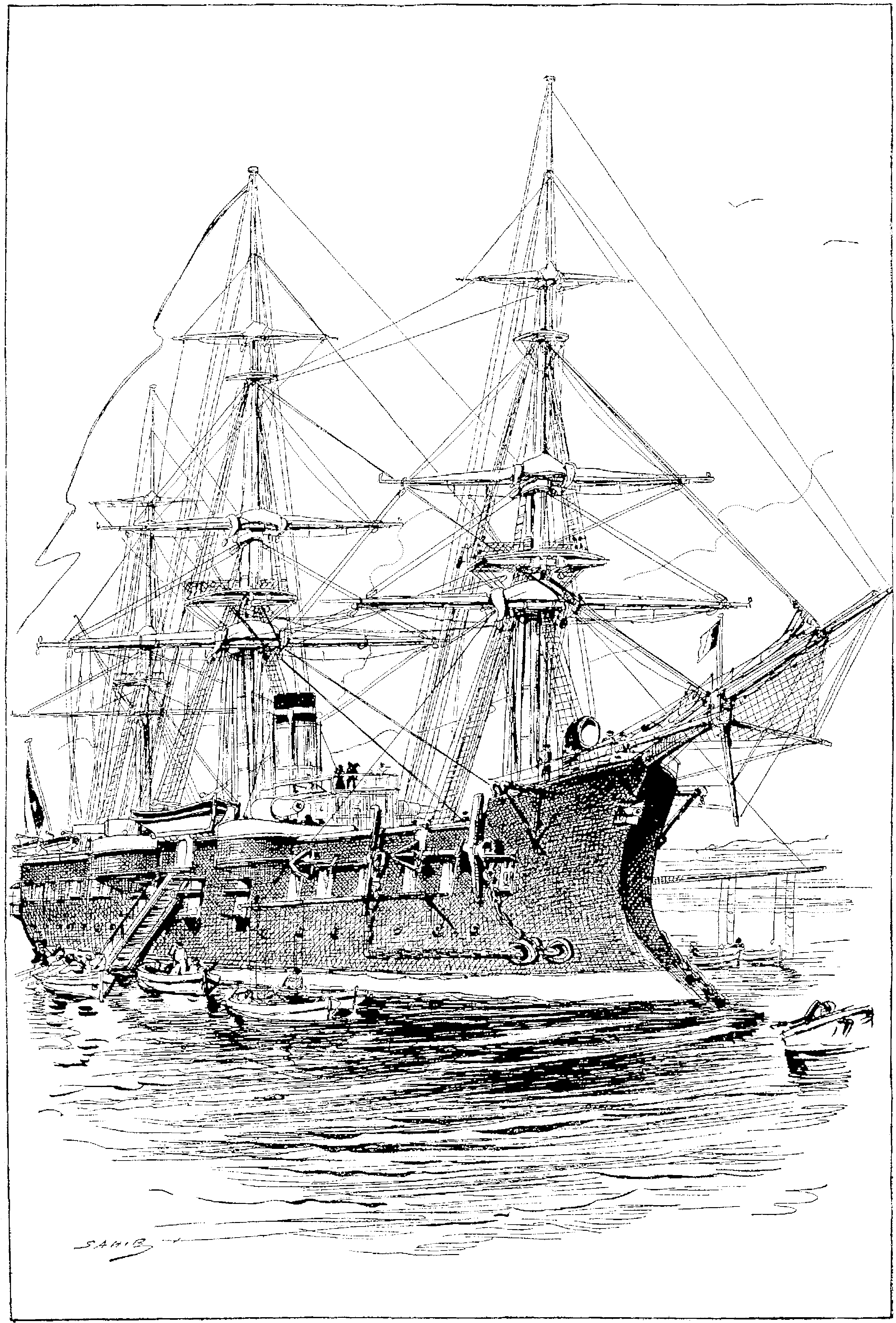 Le Richelieu, grand cuirassé d’escadre de la marine française